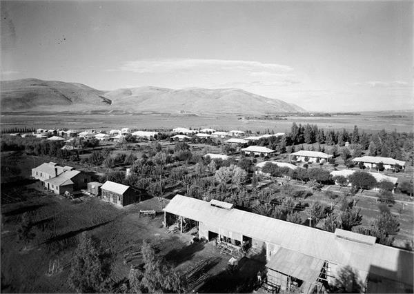 "מסילות" - עמק בית שאן - מראה כללי.